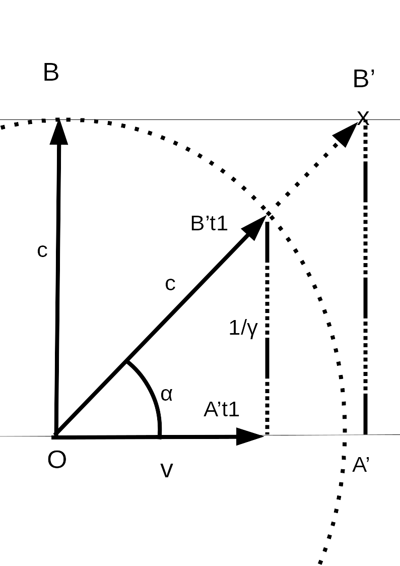 deux pendules à photon en mouvement